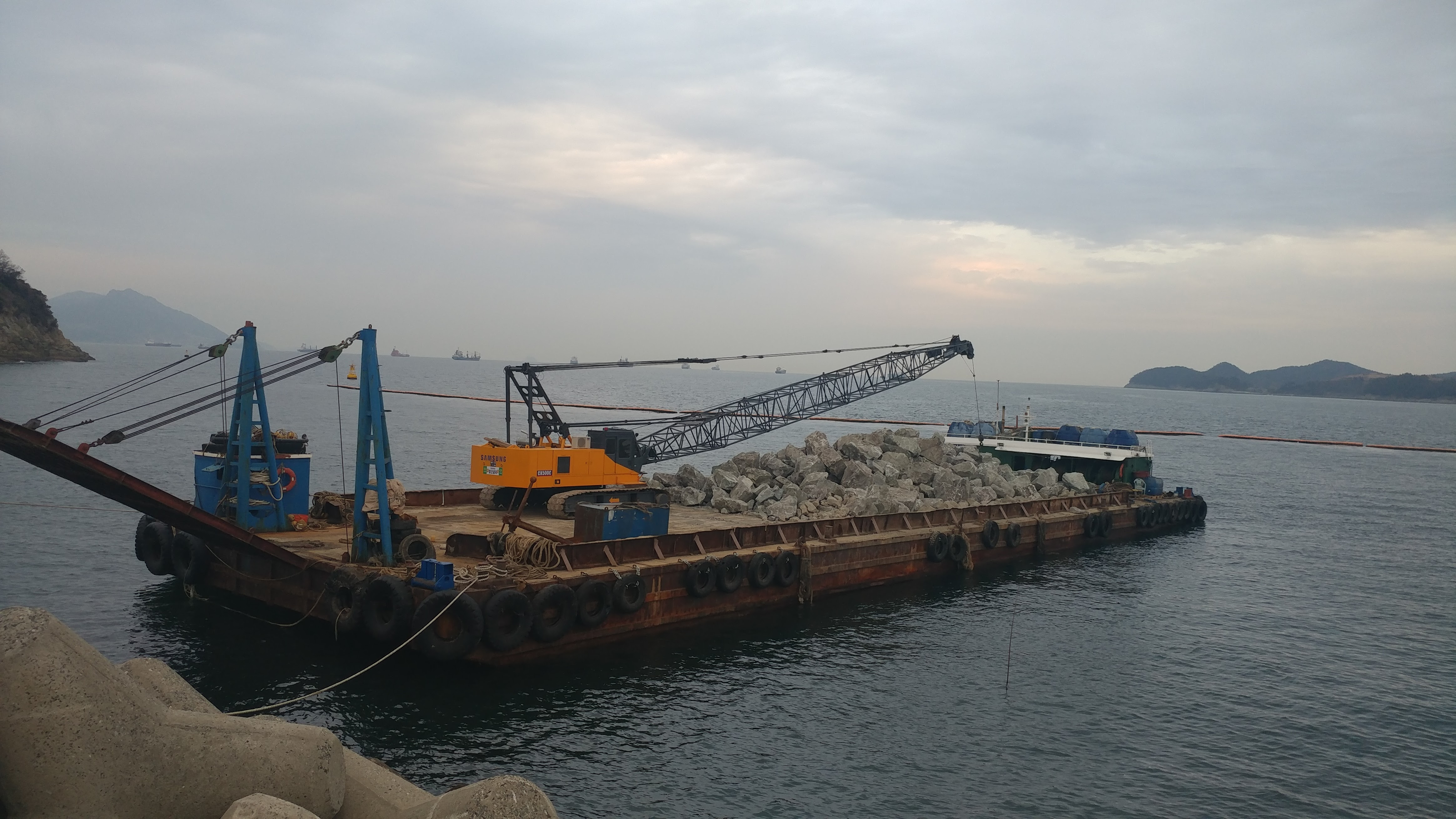 오동도 근처에 선착해 있는 바지선